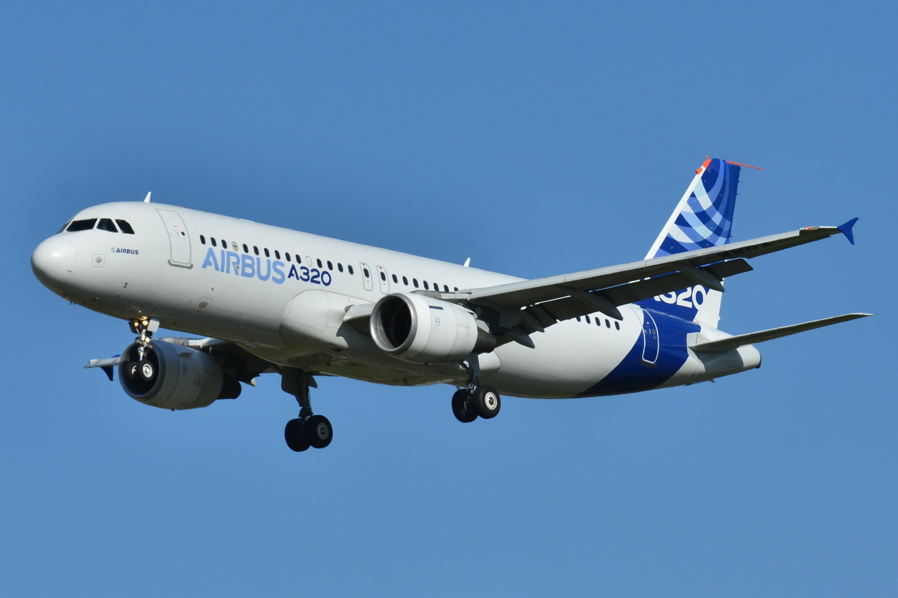 Photo prise à l'aéroport de Toulouse-Blagnac (LFBO) en France. Picture taken at Toulouse-Blagnac Airport (LFBO) in France.